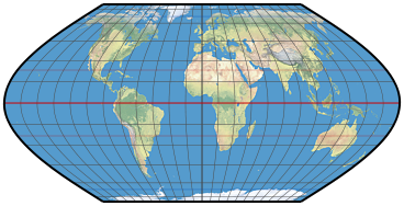 eckert 6